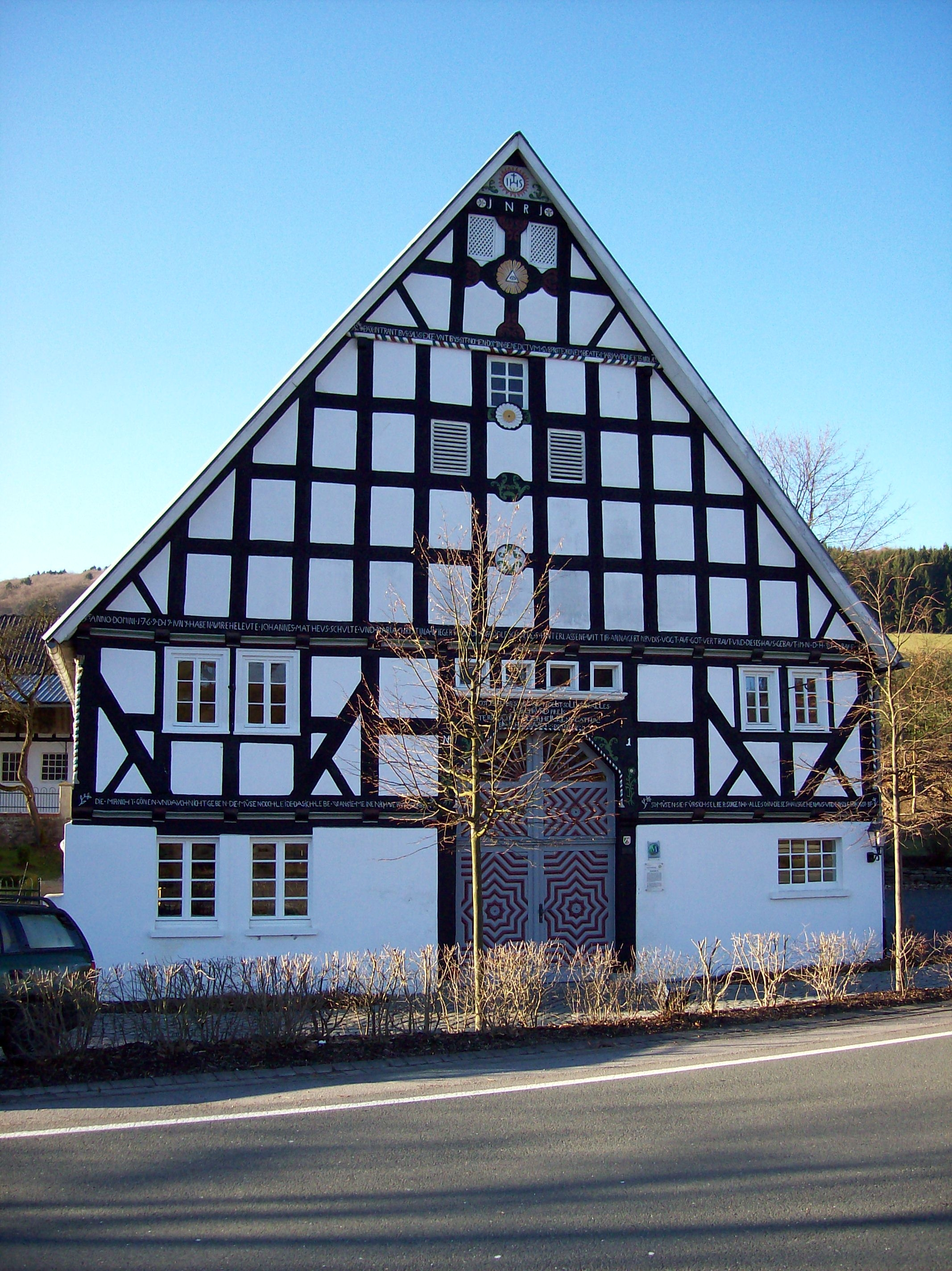 Stertschultenhof (Denkmal) in Eslohe-Cobbenrode (Germany)